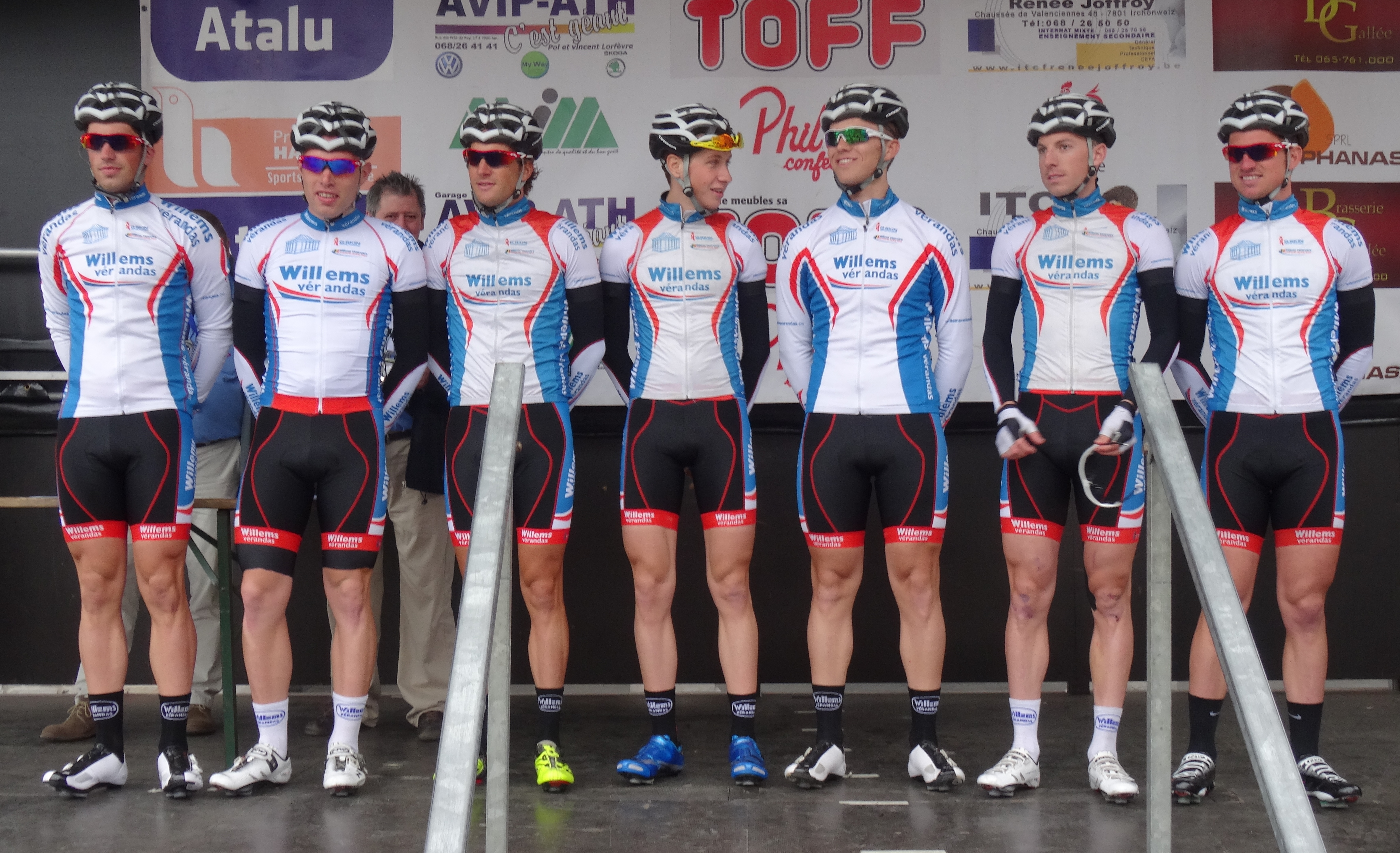 Triptyque des Monts et Châteaux 2014, étape 1, 4 avril 2014, départ d'Antoing. The creation of these files was made possible thanks to the organizers of the Triptyque des Monts et Châteaux 2014 English | français | +/− Depicted team: Verandas Willems The creation of these files was made possible thanks to the organizers of the Triptyque des Monts et Châteaux 2014 English | français | +/−